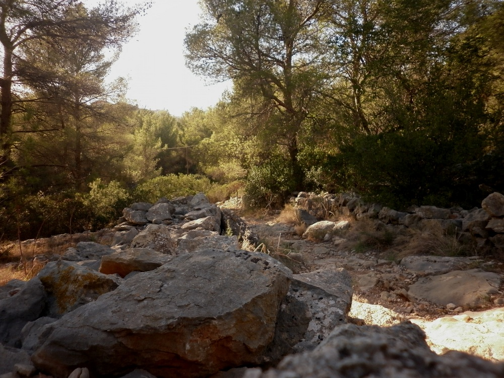 Un paisaje tipico de españa!